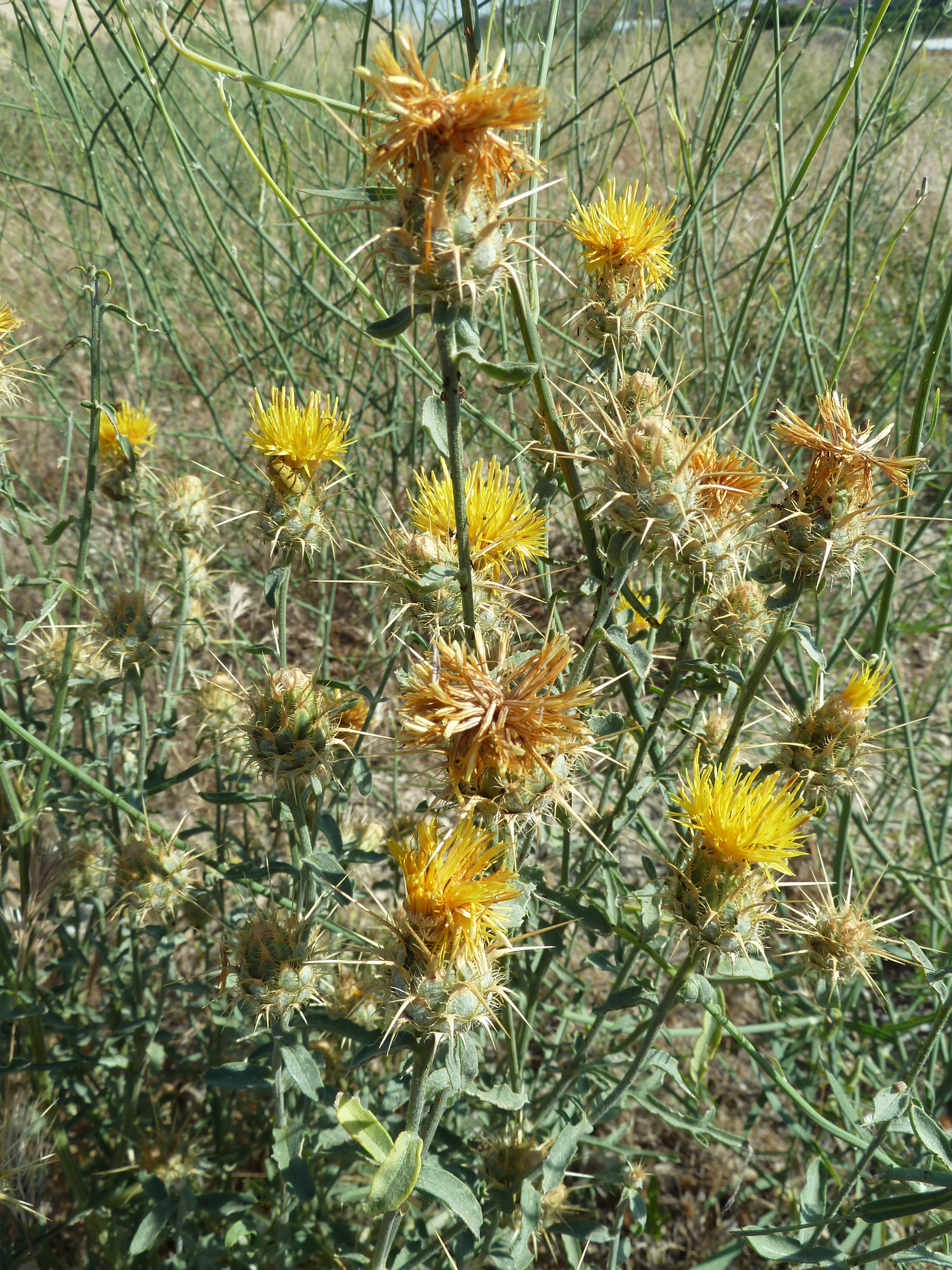 Centaurea ornata - Vista de conjunto con capítulos en diversos estados de desarrollo. - circa Estación FFCC RENFE/ADIF de contenedores de Abroñigal/Embajadores (Madrid, España).